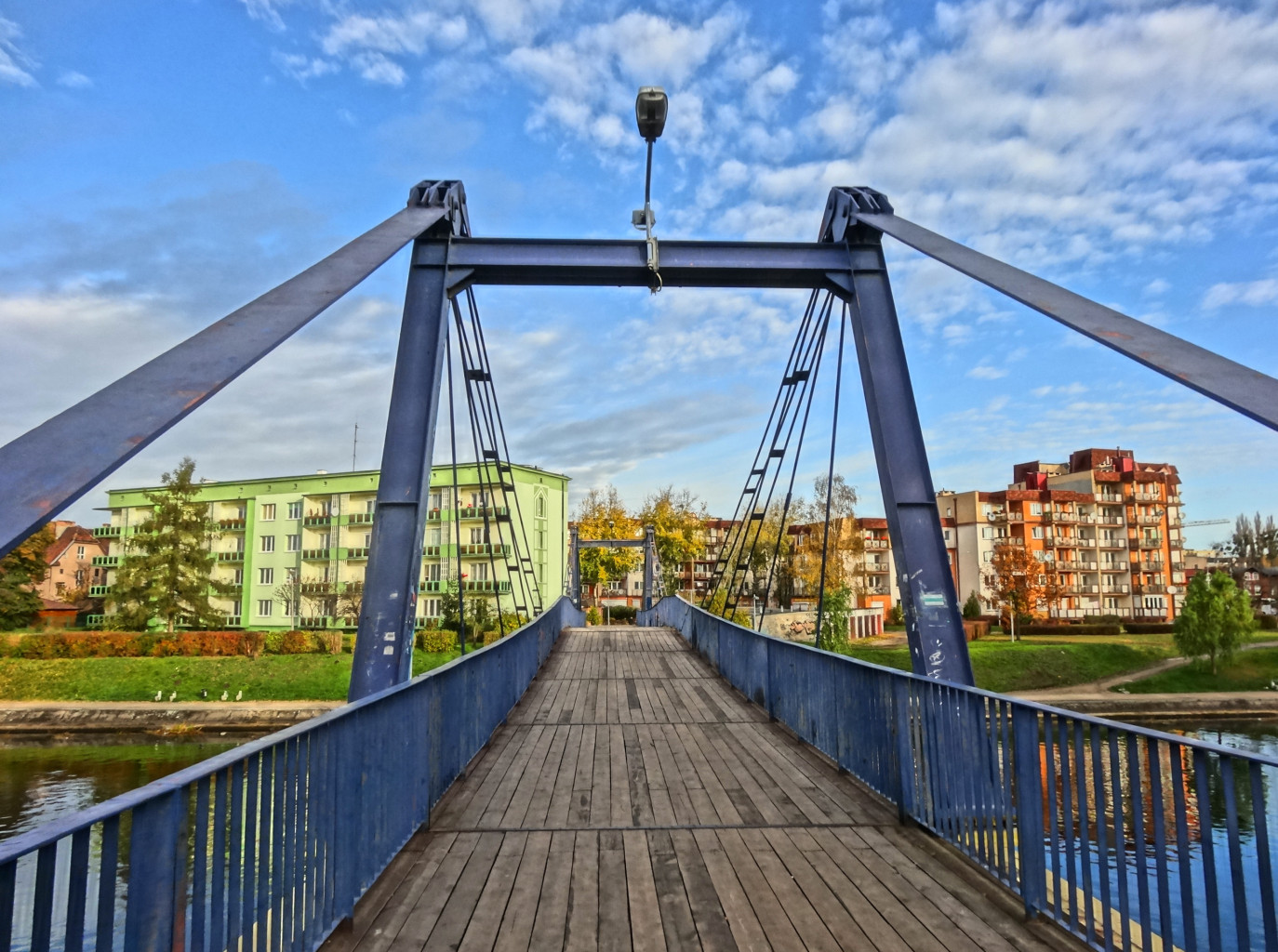 Kładka dla pieszych im. Esperanto przez Brdę w Bydgoszczy